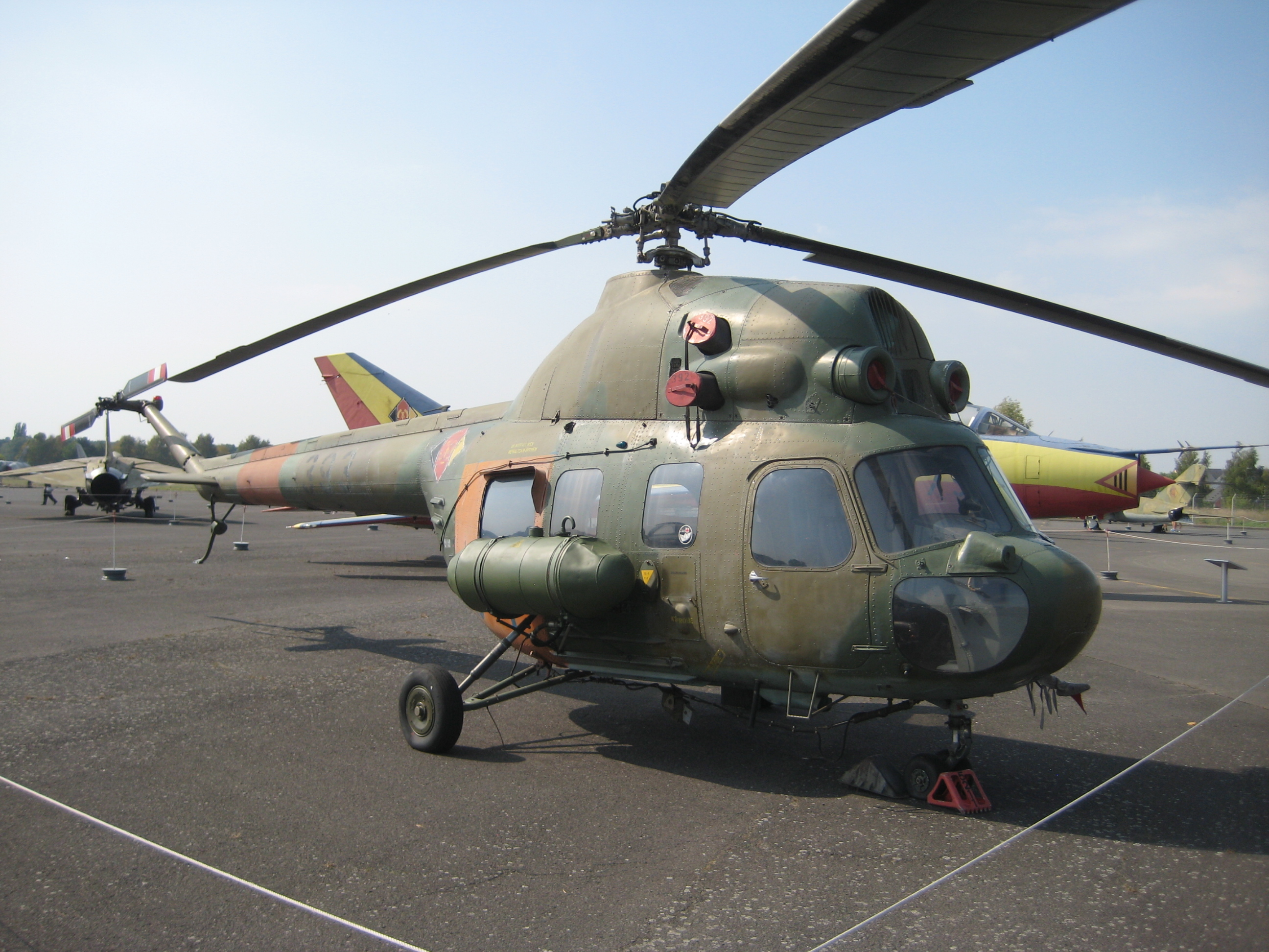 MIL MI 2 Hubschrauber, Nato Hoplite. Berlin Gatow Luftwaffenmuseum